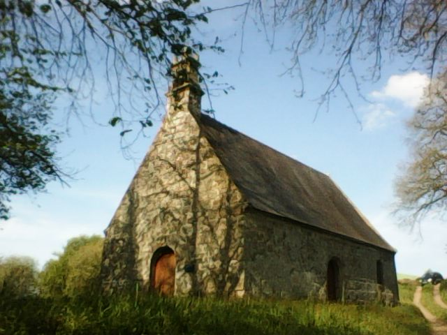 Chapelle situé sur la commune de Plounévez-Moëdec, datée du XVIème siècle